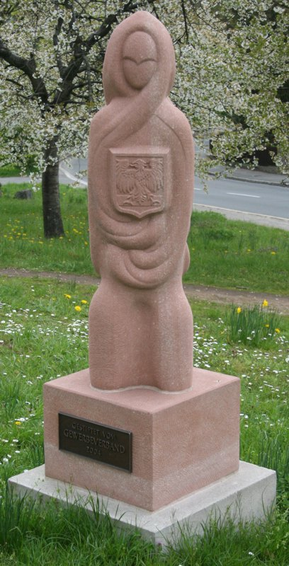 In Stein gemeißeltes „Martinerla“ (Gebäck), Roßtal, Bayern